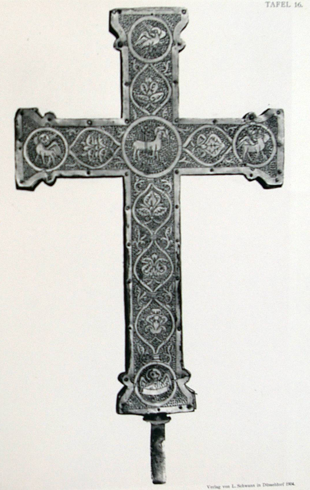 Tafel 16 rechts von Georg Humanns „Die Kunstwerke der Münsterkirche zu Essen“: Rückseite des Mathildenkreuzes, Abbildung aus Georg Humanns Tafelwerk 1904